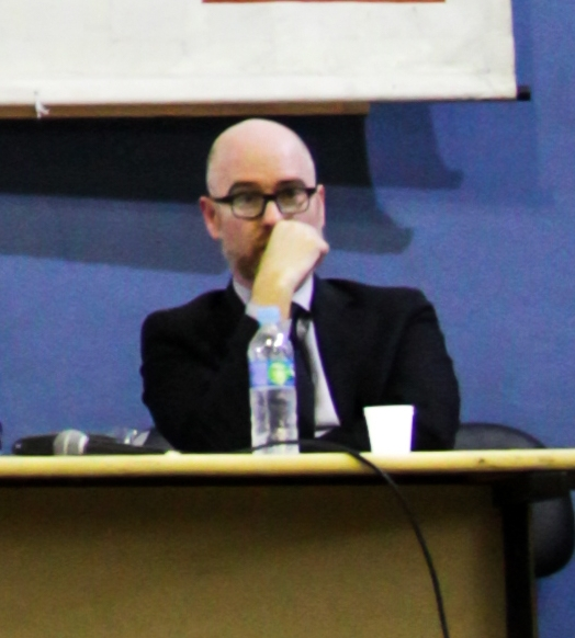 Satafle em 2015.